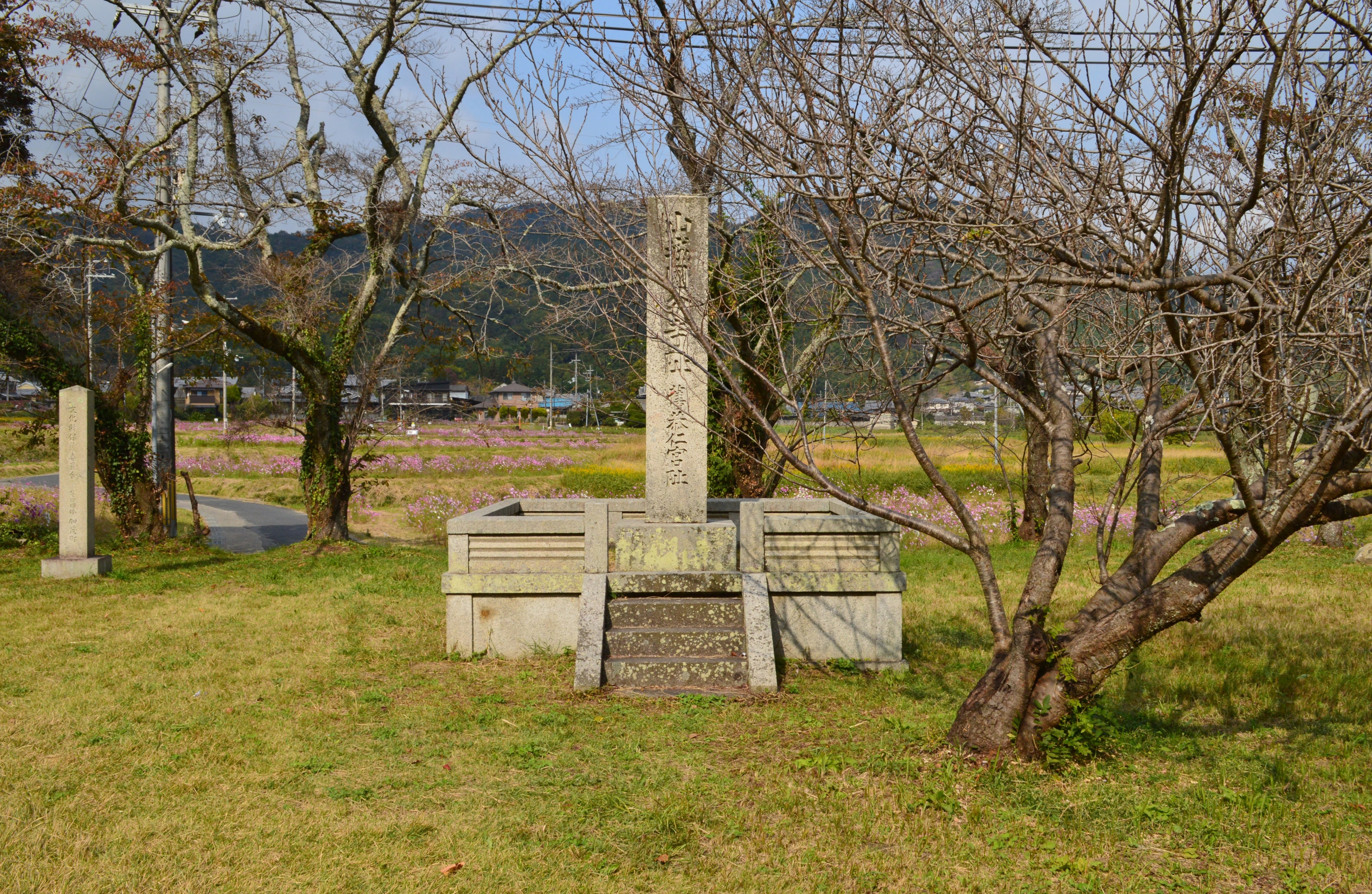 恭仁京跡大極殿 (山城国分寺跡金堂) 石碑